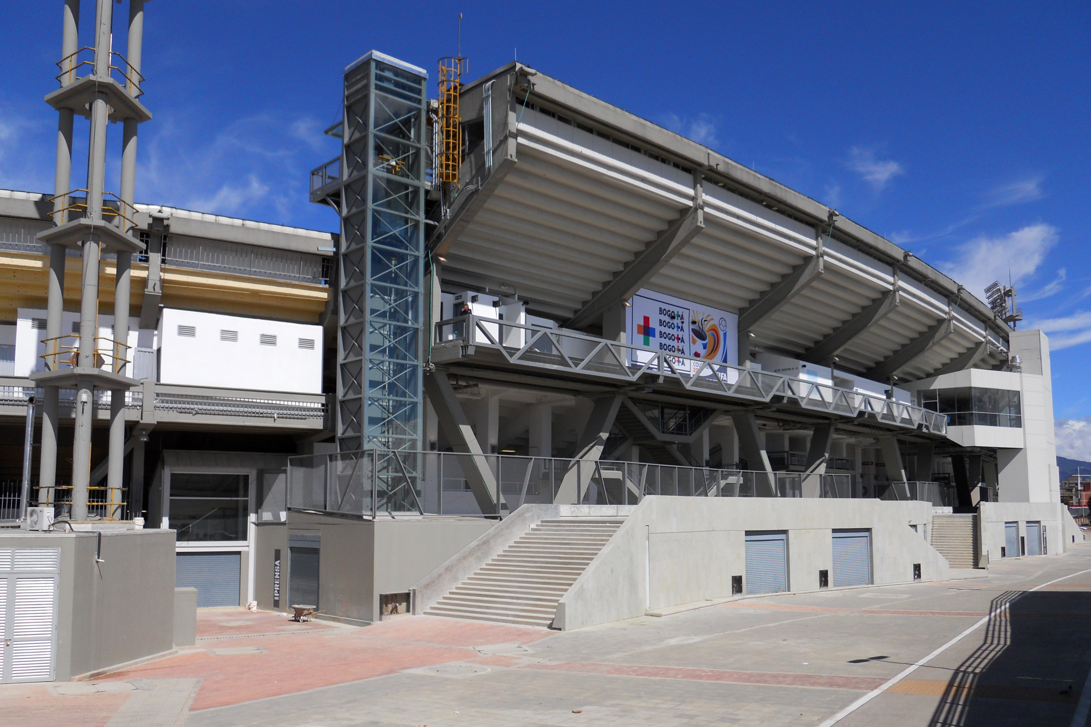 Costado noroccidental del estadio El Campín.